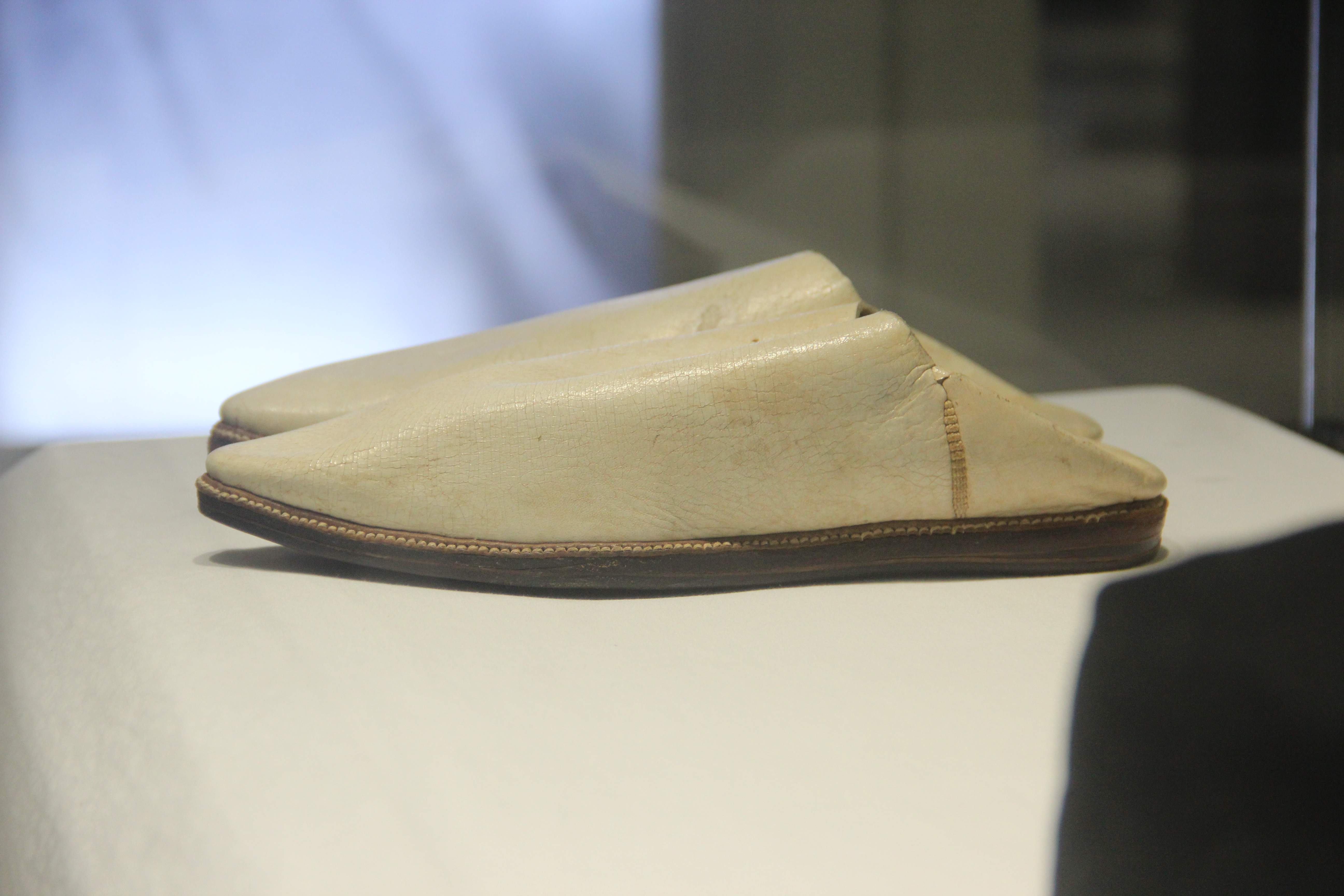 Babouches de Serigne Babacar Sy, exposées au Musée des Civilisations Noires de Dakar (Sénégal). This is an image with the theme "Africa on the Move or Transport" from: Senegal